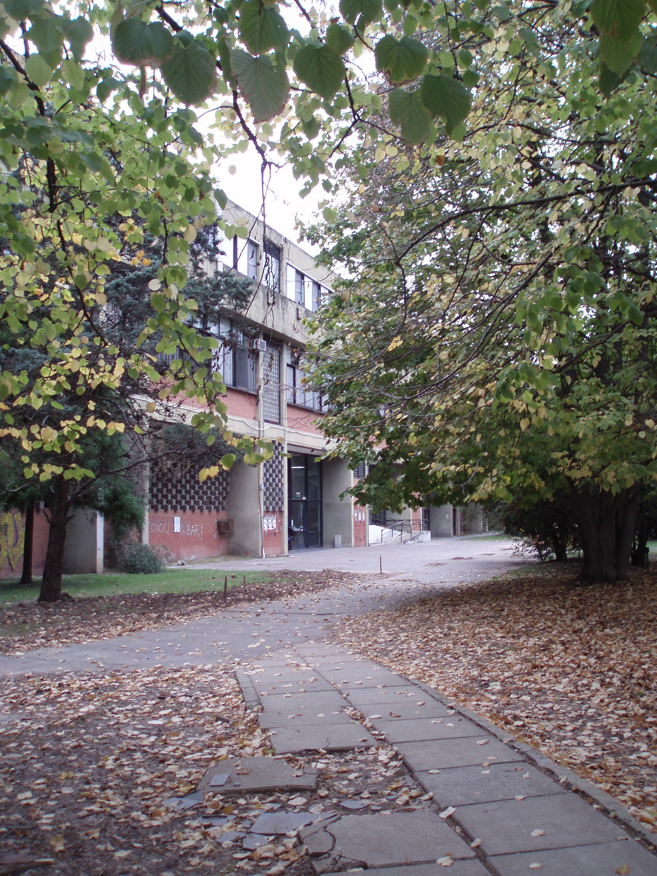 Vista del parque del Pabellón 1 de la Facultad de Ciencias Exactas y Naturales de la Ciudad Universitaria de Buenos Aires.